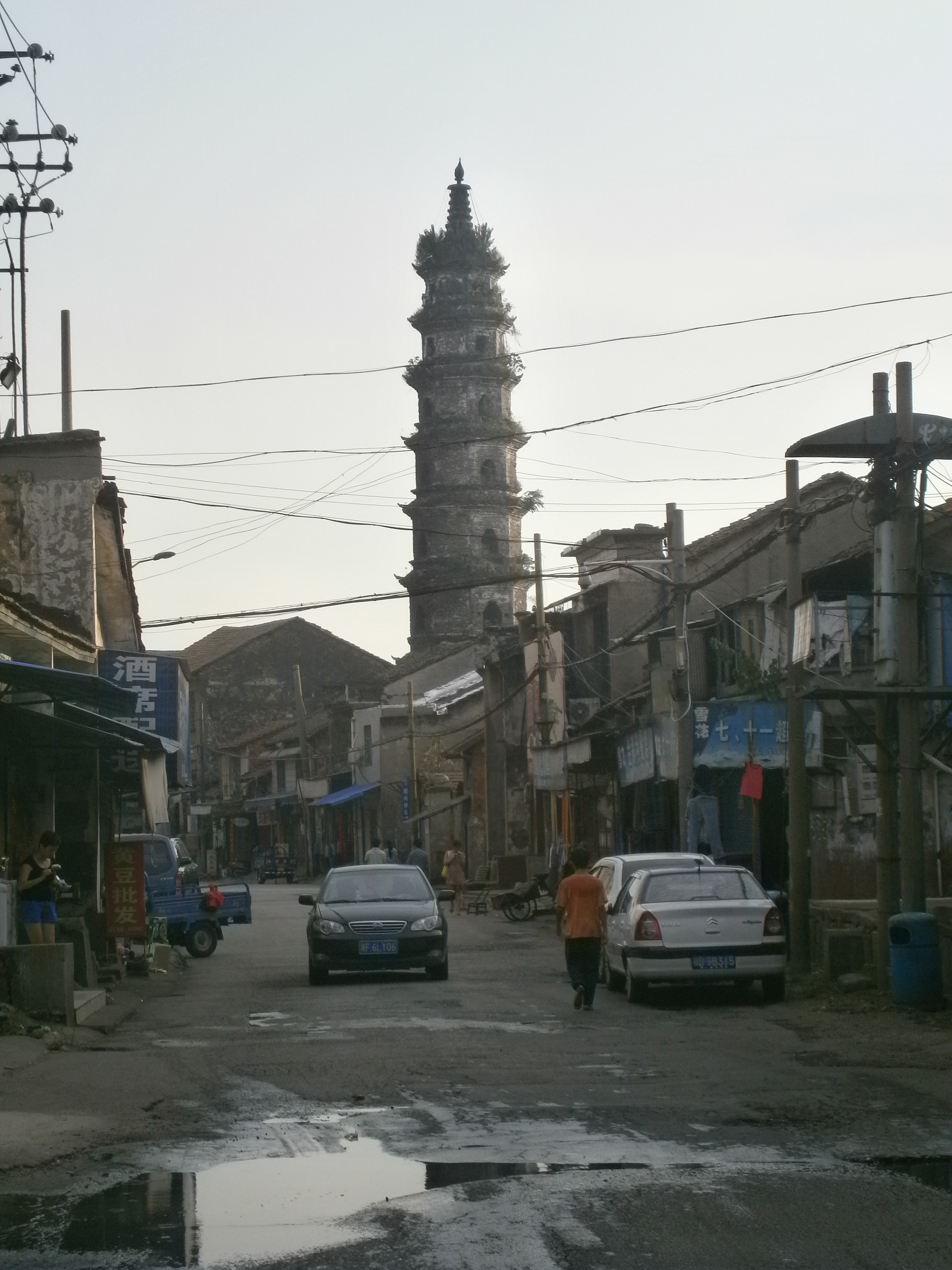 慈氏塔及周边环境